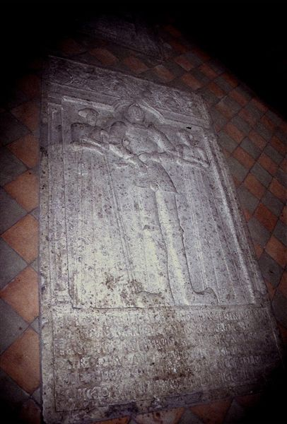 Mariager klosterkirke i Danmark. Gravsten over Otte Krumpen, Drude Krummedige og Anne Lykke